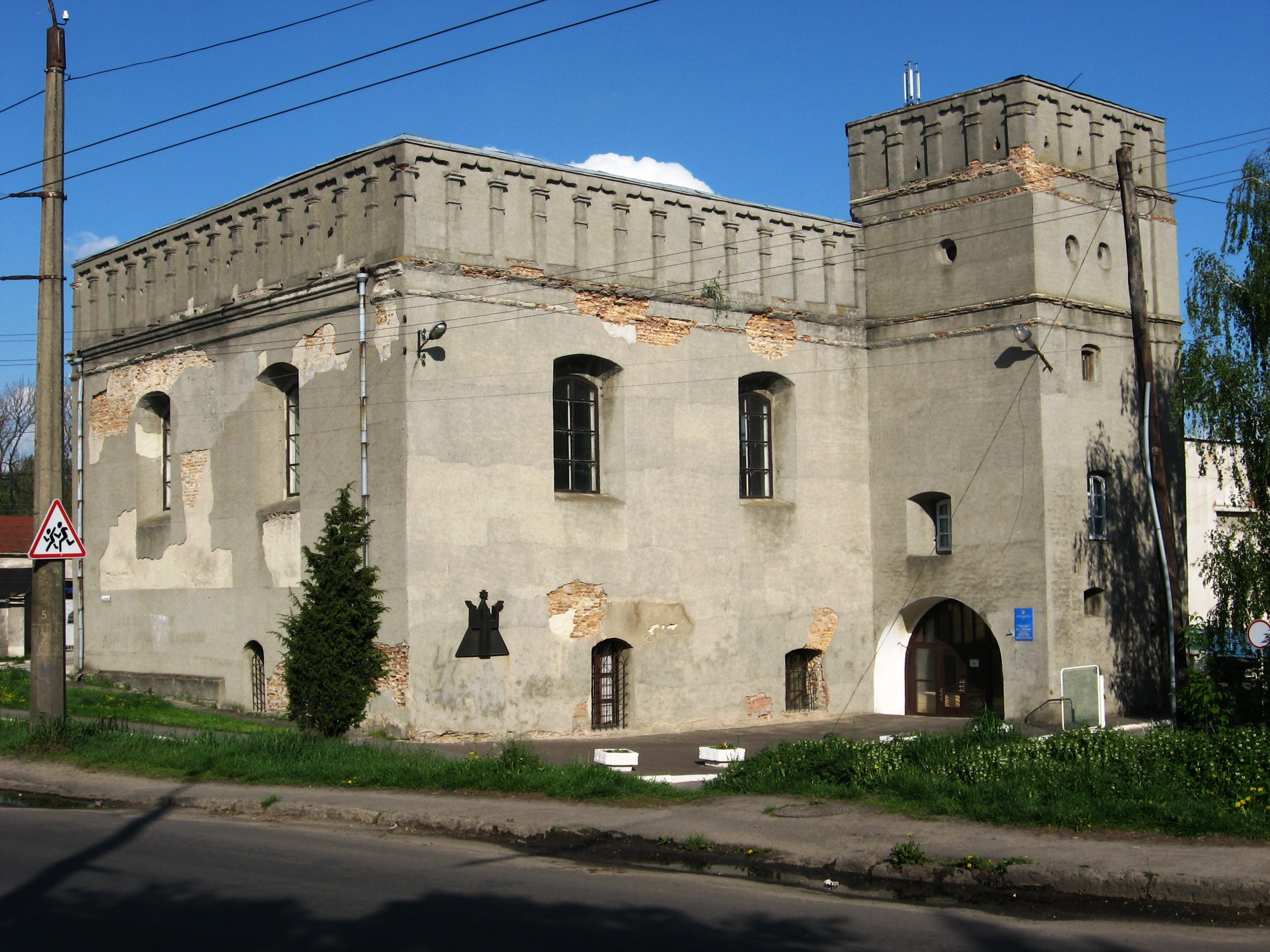 Луцьк. Синагога